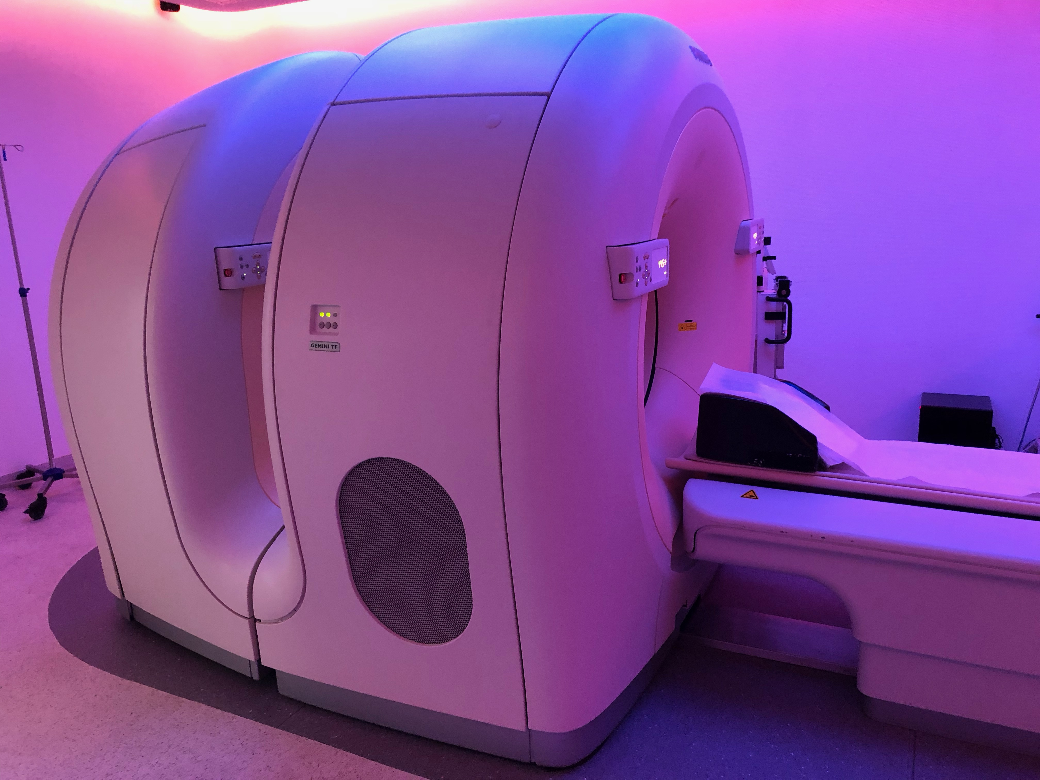 PET-CT-Philips